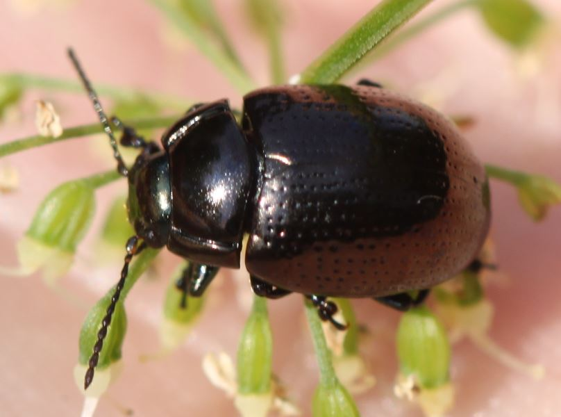 Chrysolina oricalcia am 4. Juni 2018 in der Schwetzinger Hardt